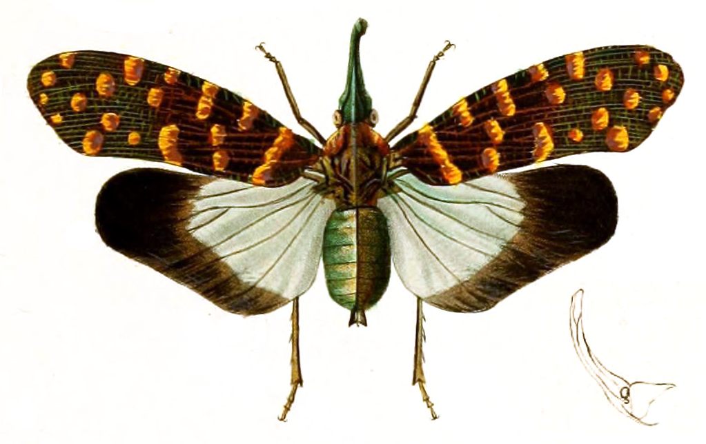 Laternaria delessertii